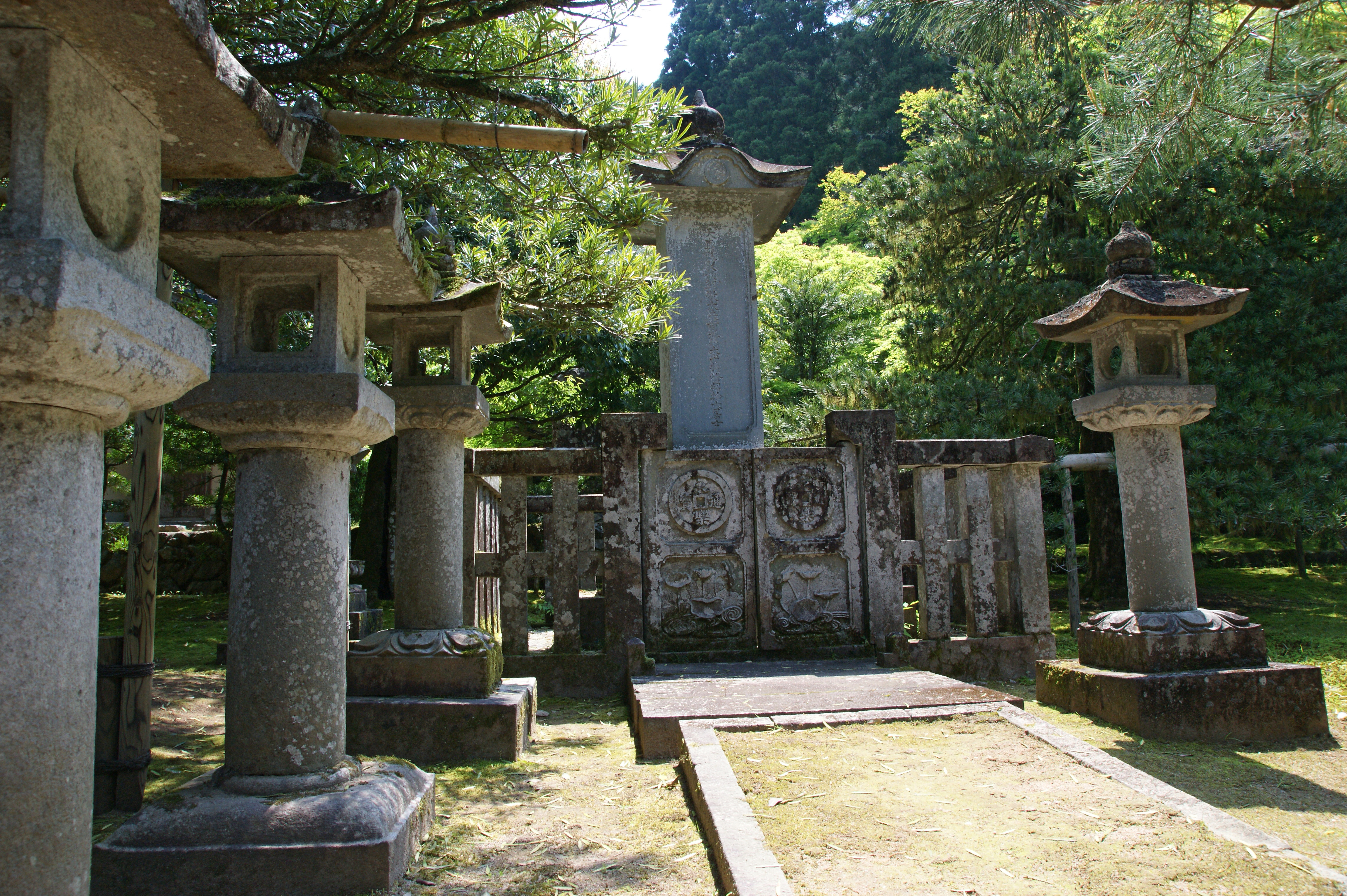 Sukyoji in Izushi, Toyooka, Hyogo prefecture, Japan